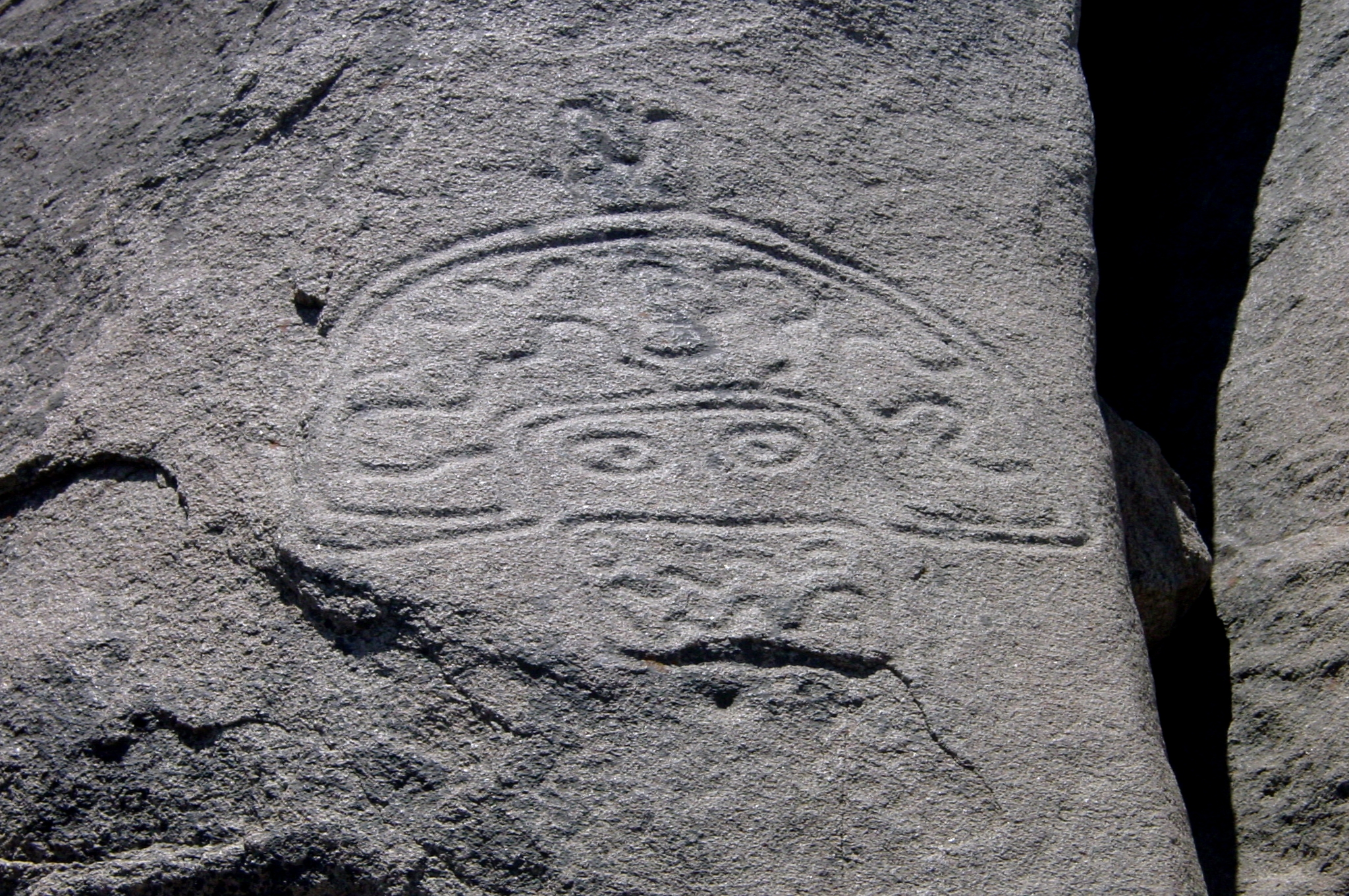 Valle del Encanto, à côté d'Ovalle, province de Limari, région IV, Chili.